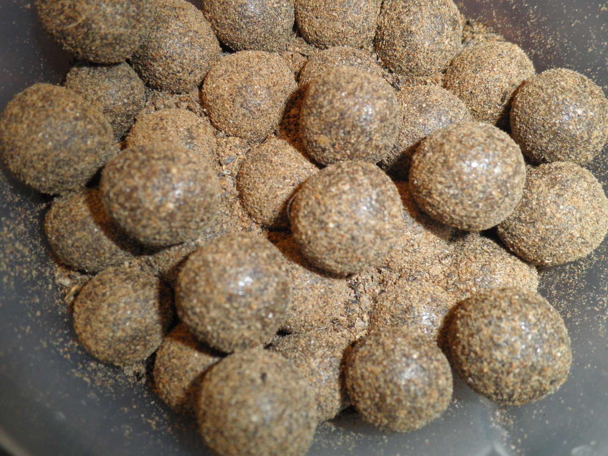 Пылики